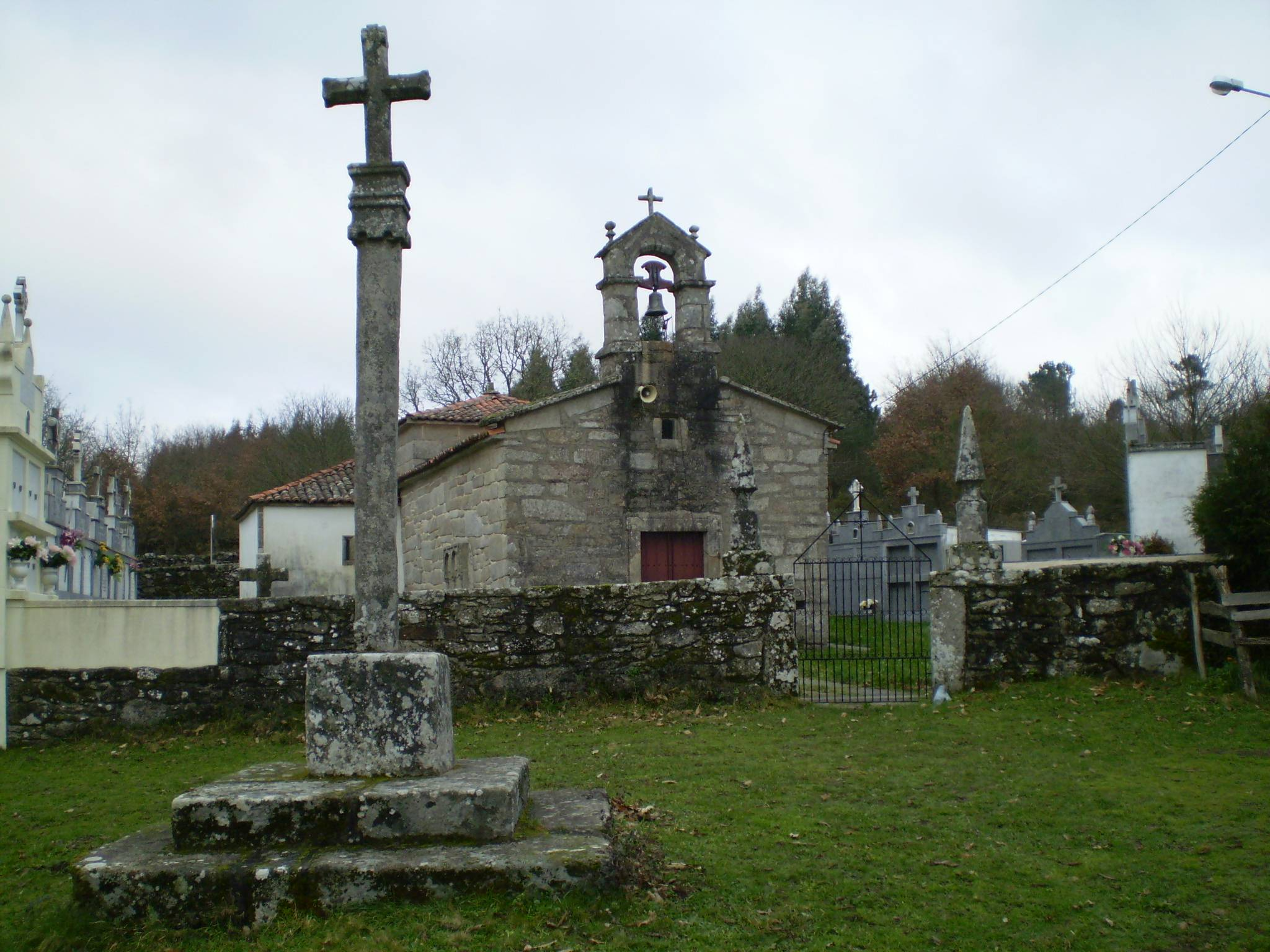 Igrexa de Cutián (Antas de Ulla)